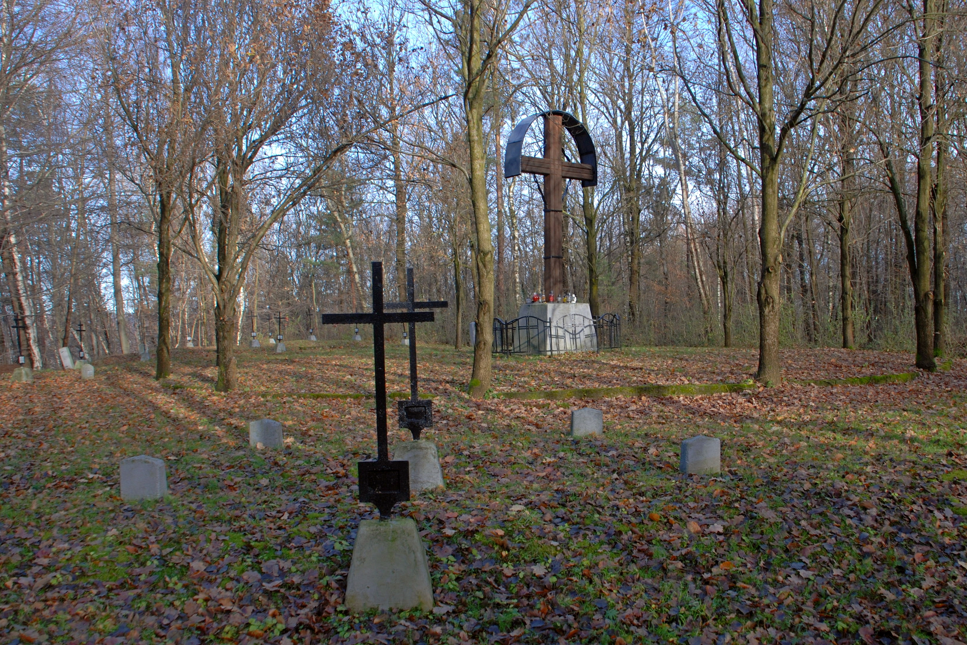 wieś Gorzejowa